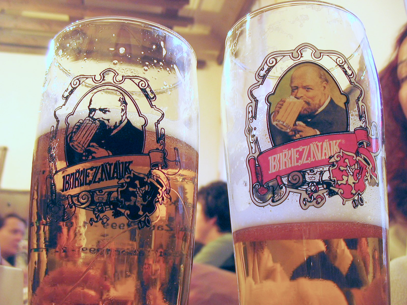 Glasses of Breznak beer